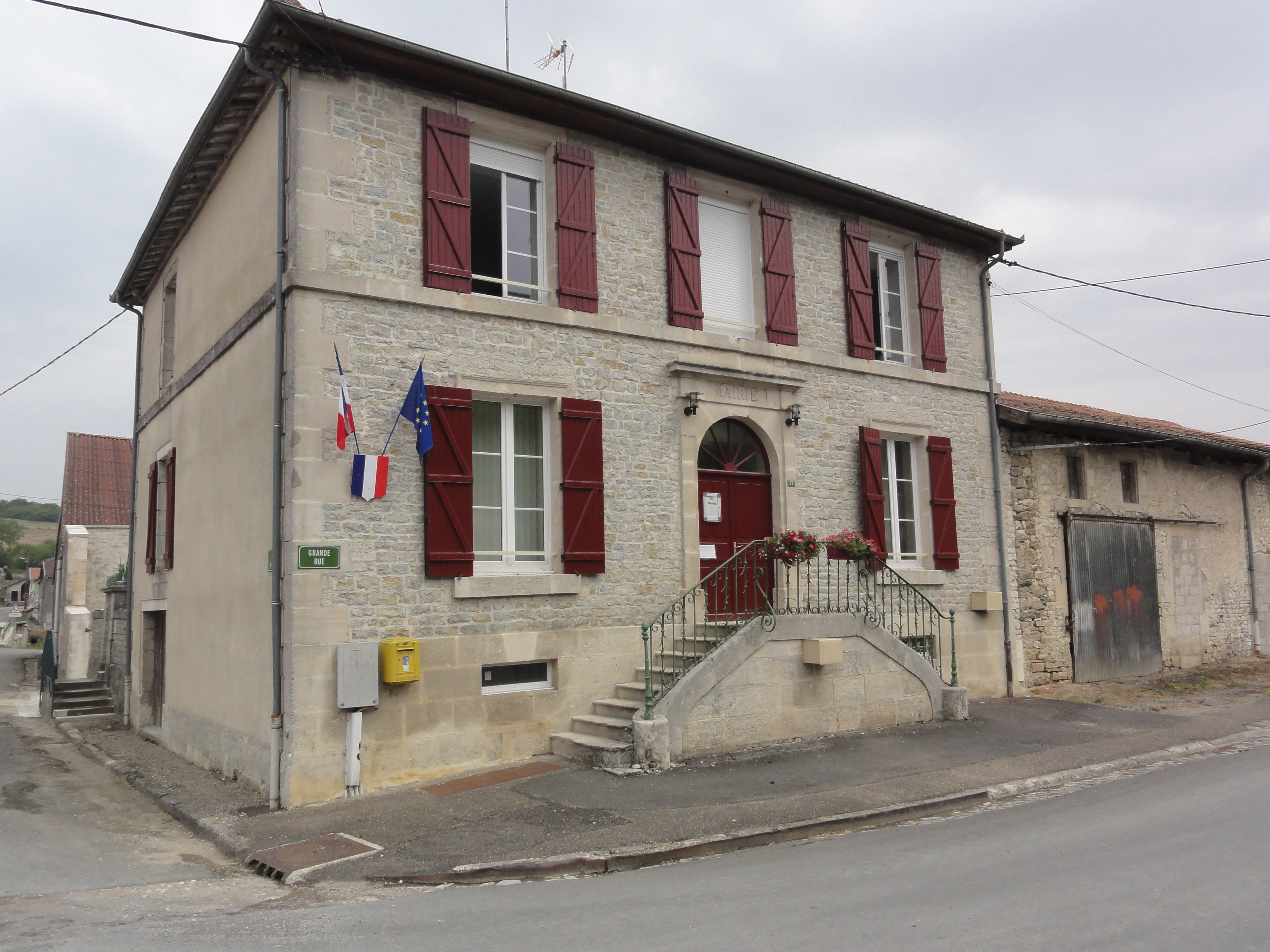 Récicourt (Meuse) mairie